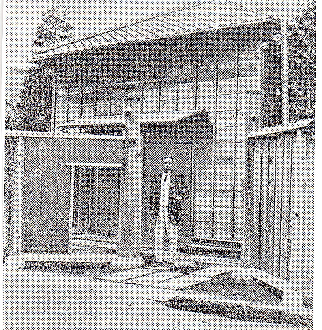 Japanese Christian Leader Kanzo Uchimura in front of Imai Hall which was built in 1913